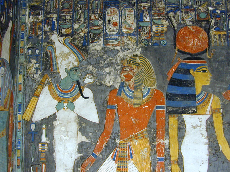 Detail de la frise du puits. Horemheb entre Osiris (à gauche) portant le fouet et le sceptre royaux et Hathor (à droite) Maîtresse de l'Ouest, du Ciel et de tous les Dieux. Elle porte une perruque inhabituelle à bandes superposées, au-dessus les cornes de vache enfermant le disque solaire. Horemheb a été le dernier pharaon de la XVIIIème dynastie. Il a rétabli le culte d'Amon en s'efforçant d'effacer toutes traces du prédécesseur de Toutankhamon, son père Aménophis IV : Akhénaton.